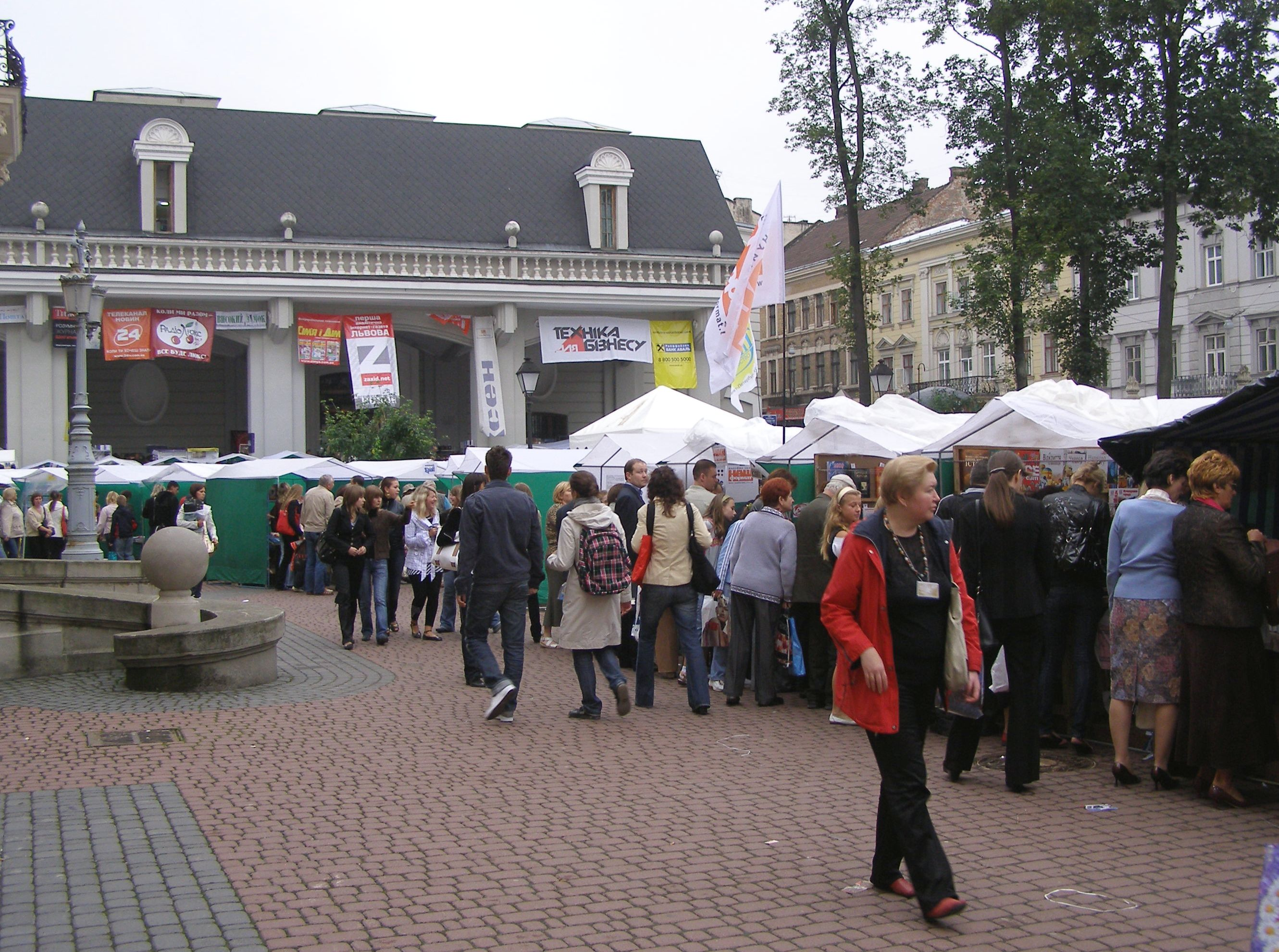 Lemberger Buchforum 2008